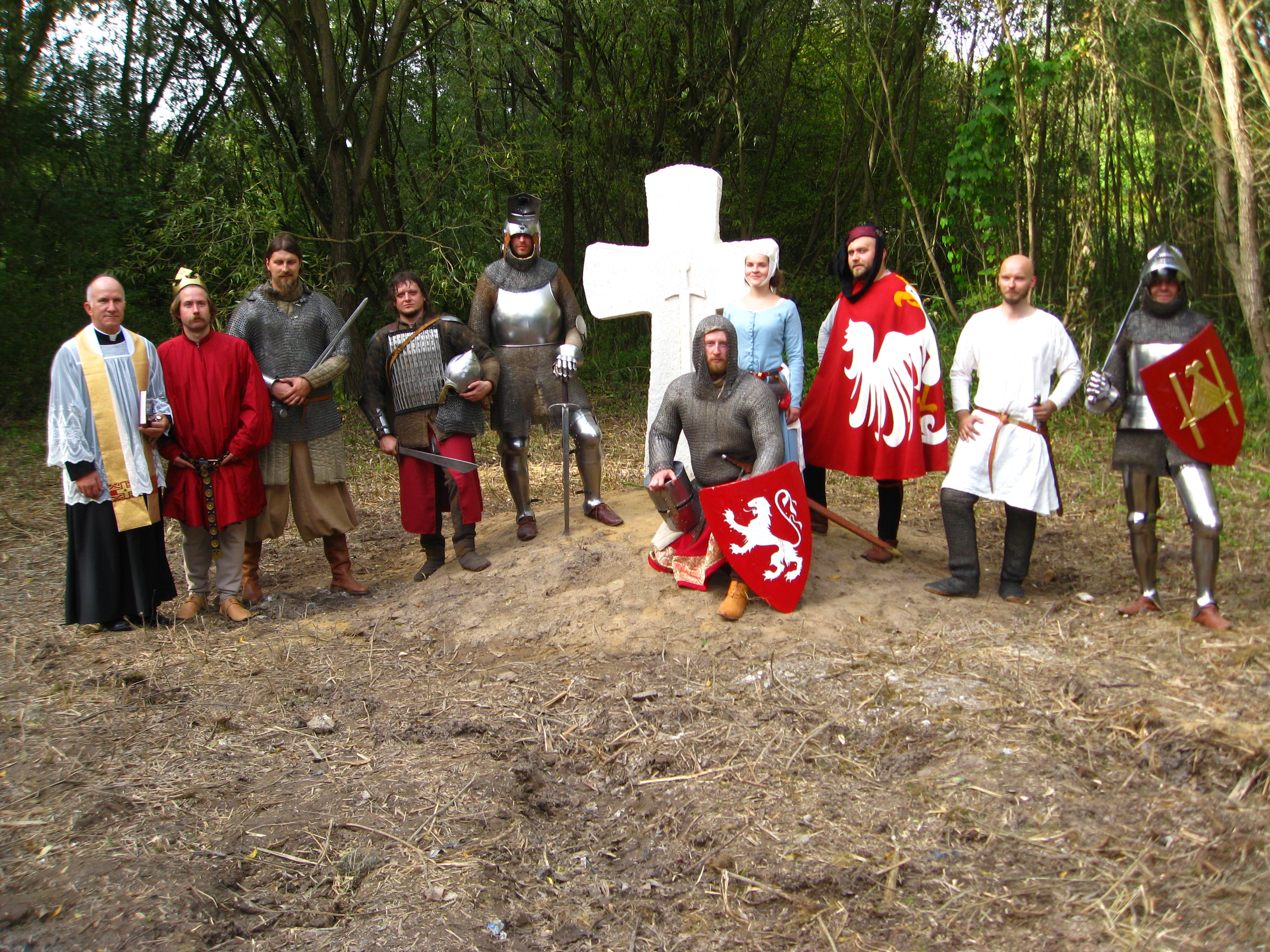 fundacja krzyża pokutnego